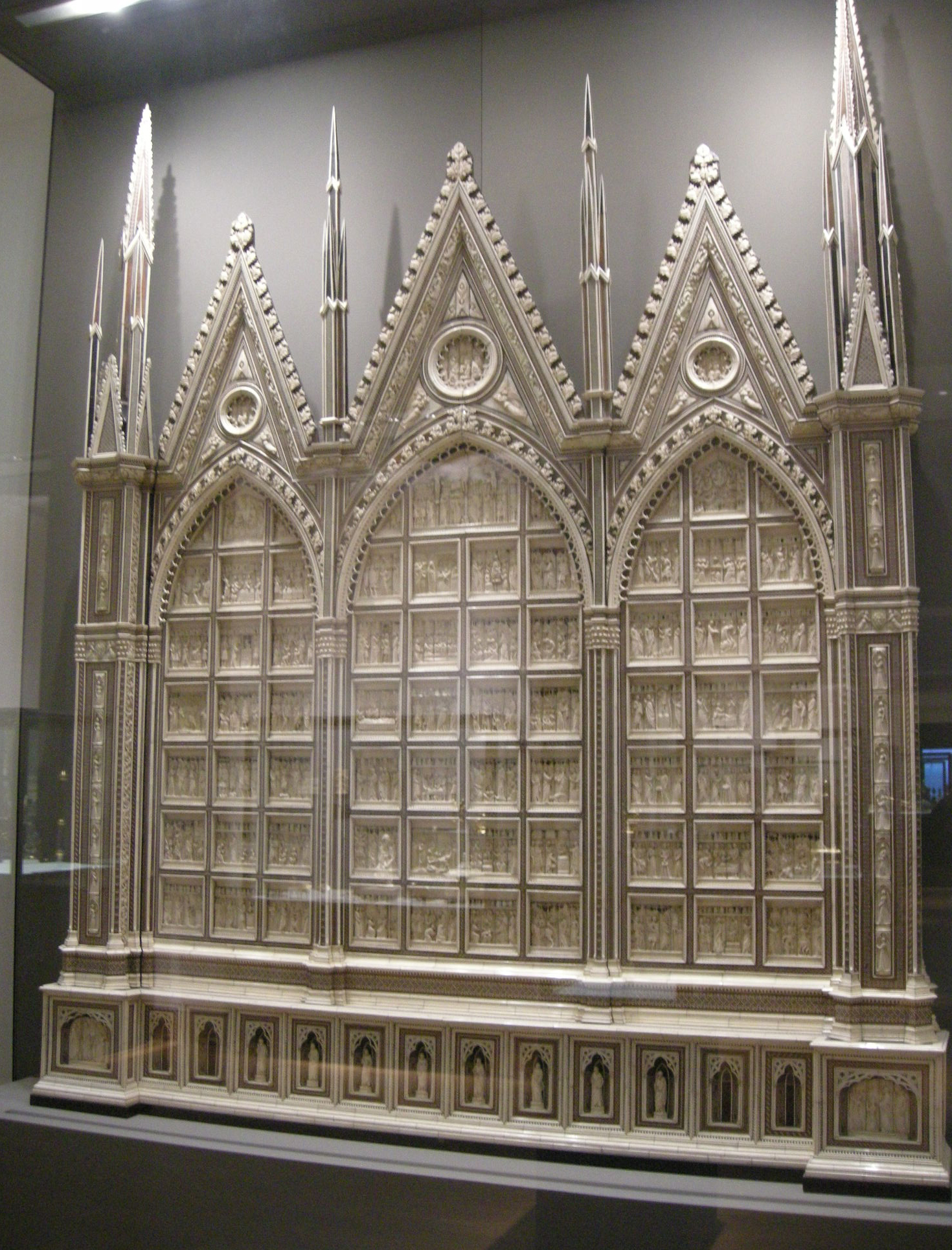 Retablo della bottega degli embriachi 01.JPG